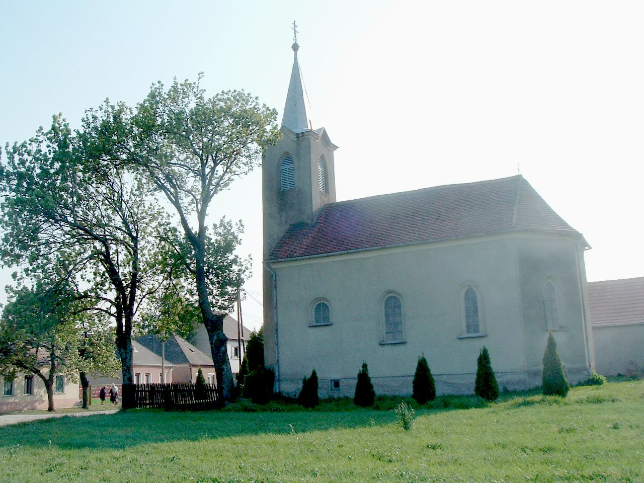 Nemescsó, Szent Péter és Pál római katolikus templom